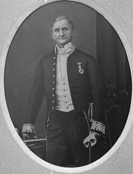 Pierre Benoni Goullin (1799-21 mars 1875), négociant nantais né et mort dans cette vile, consul de Belgique, Président du Tribunal de Commerce de Nantes, membre de la Chambre de Commerce et du Conseil Municipal de Nantes